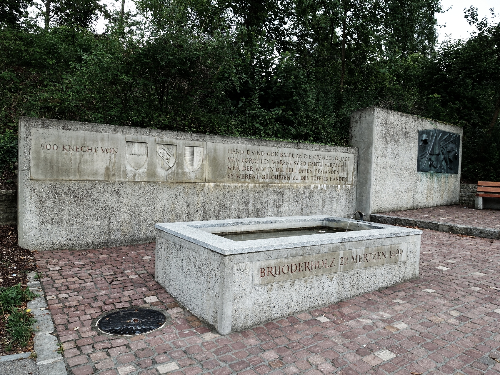 Gefecht am Bruderholz, 22. März 1499, Bruderholz Denkmal in Reinach, Standort, Bruderholzstrasse-Binningerstrasse. Der Bildhauer Louis Léon Weber hat das Denkmal geschaffen